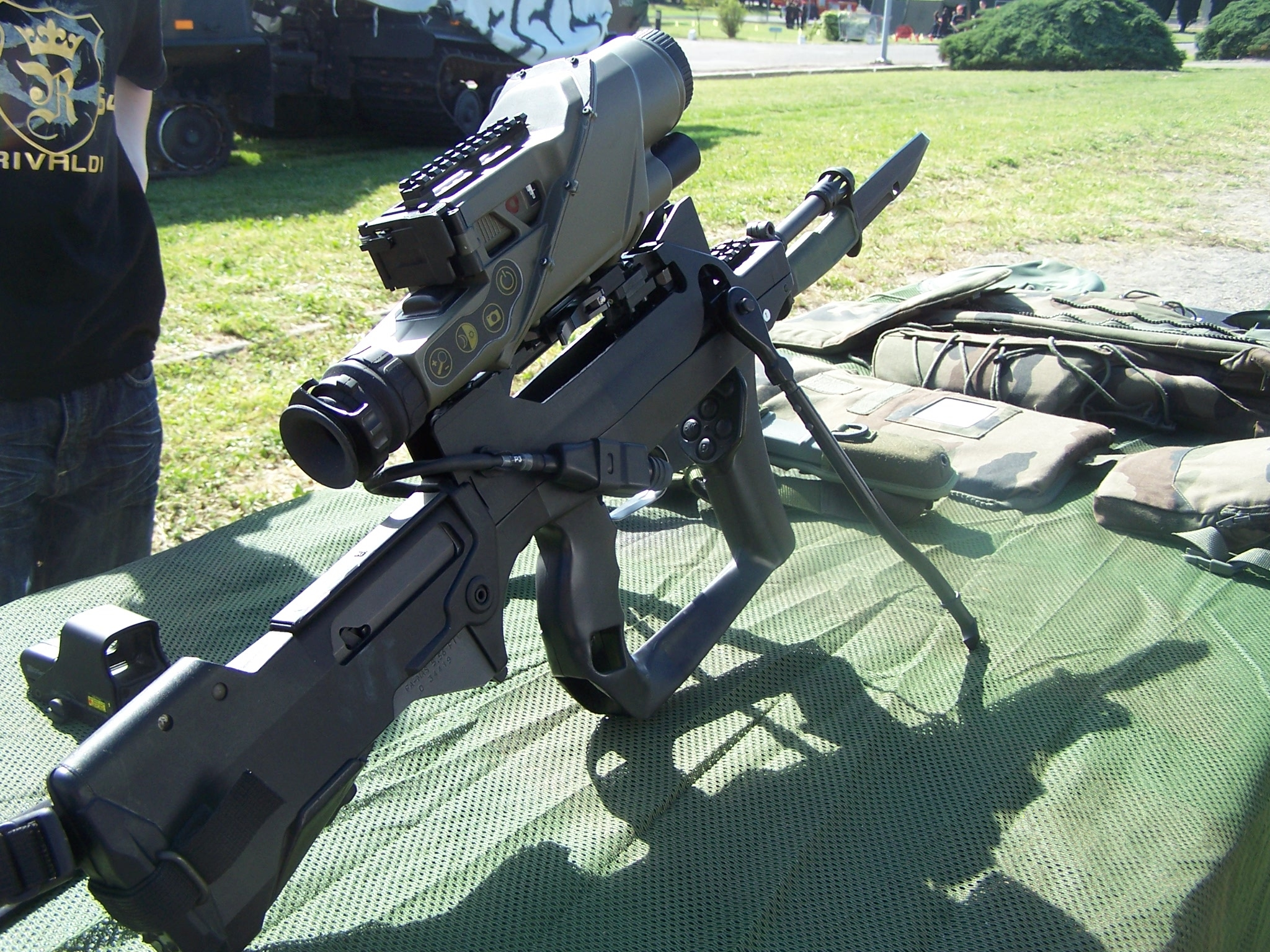 FUSIL D'ASSAUT FAMAS FELIN